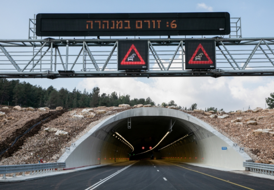 tunnel